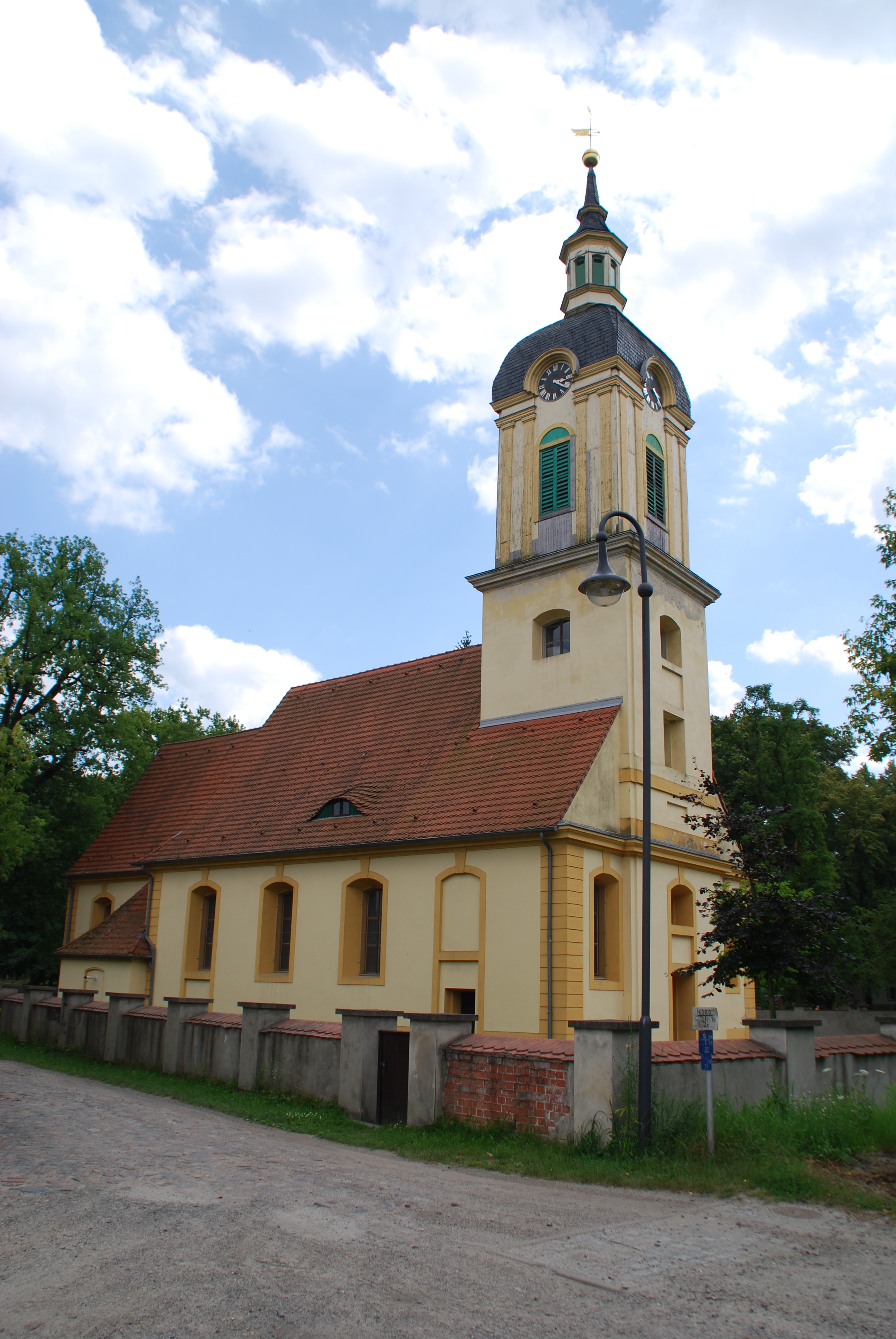 Schlosskirche Schöneiche